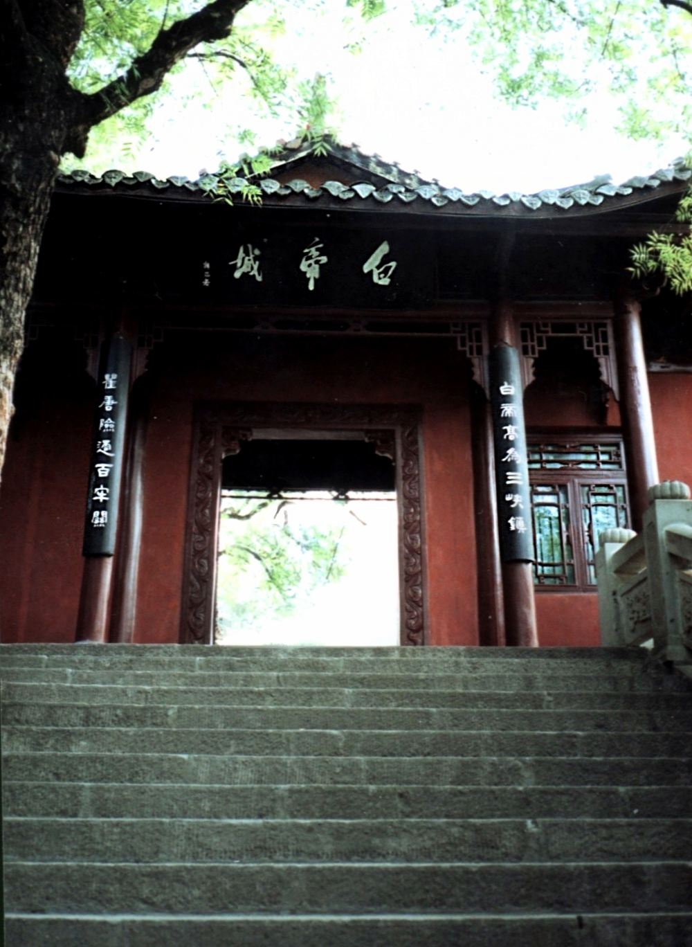 Baidi city,Chongqing, 四川省重庆市奉节县白帝城